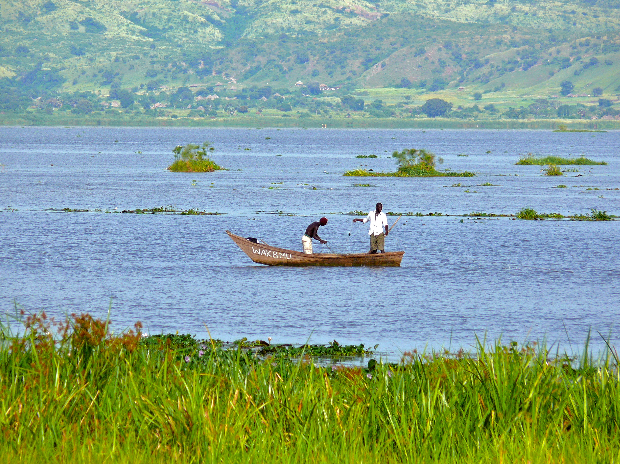 Murchison Falls NP, UGANDA